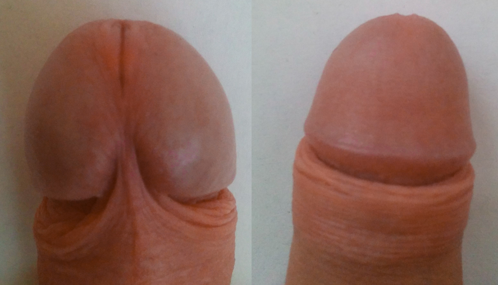 Gland humain. Face inférieur (gauche), Face supérieure (droite)